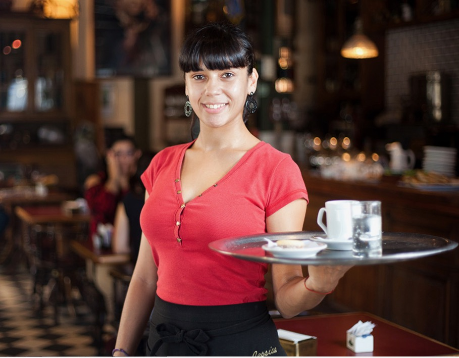 Foto: Estrella Herrera